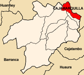 Distrito de Cajamarquilla